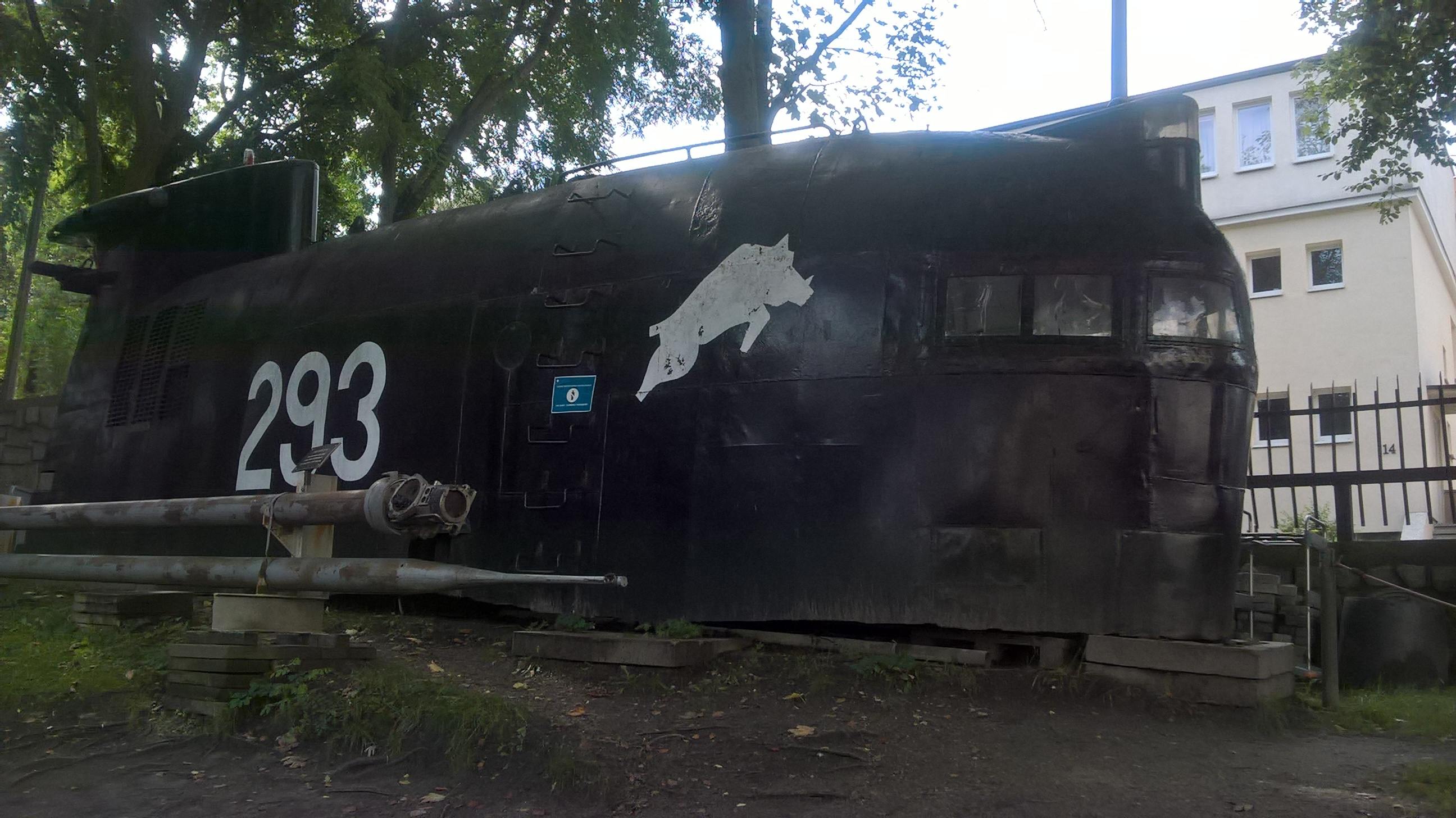 Kiosk okrętu podwodnego ORP "Dzik" eksponowany w Muzeum Marynarki Wojennej w Gdyni.